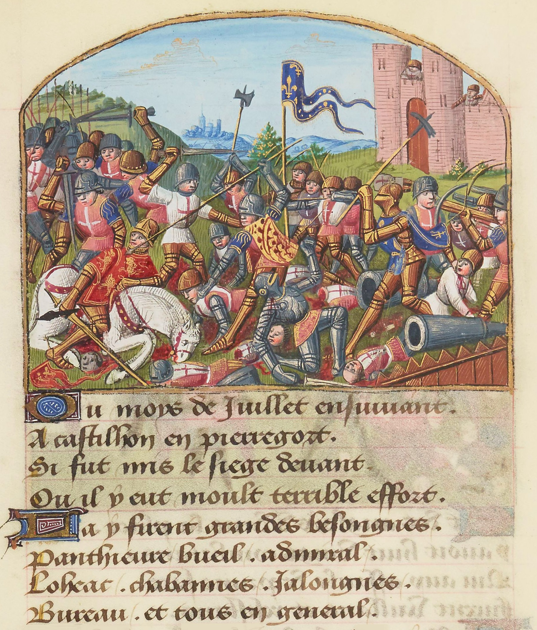 La mort de Talbot à la bataille de Castillon, le 17 juillet 1453. Enluminure du manuscrit de Martial d'Auvergne, Les Vigiles de Charles VII, vers 1484, BnF, Manuscrit Français 5054, enluminure du folio 229 verso (détail).